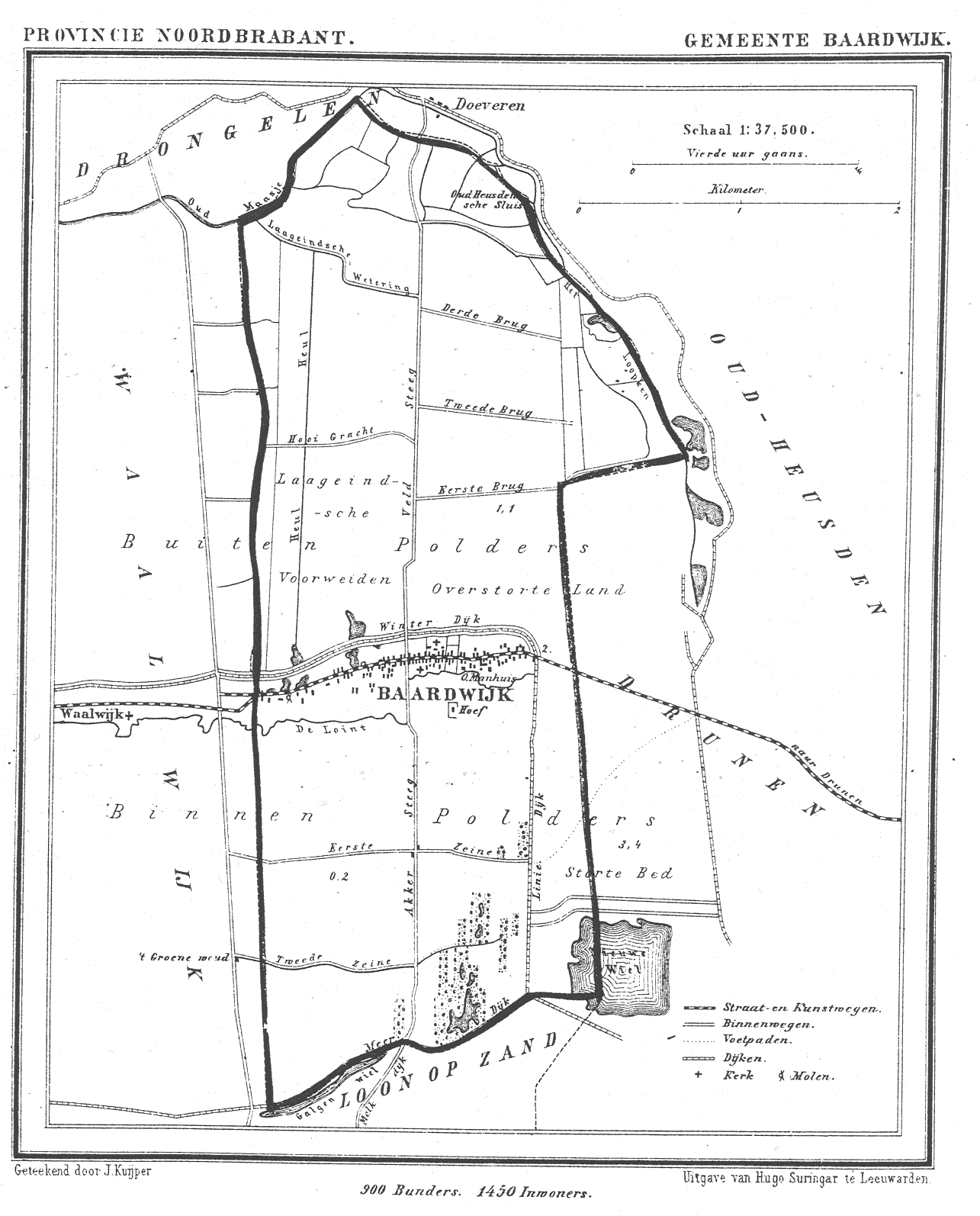 Nederland, Noord-Brabant, Gemeente Baardwijk